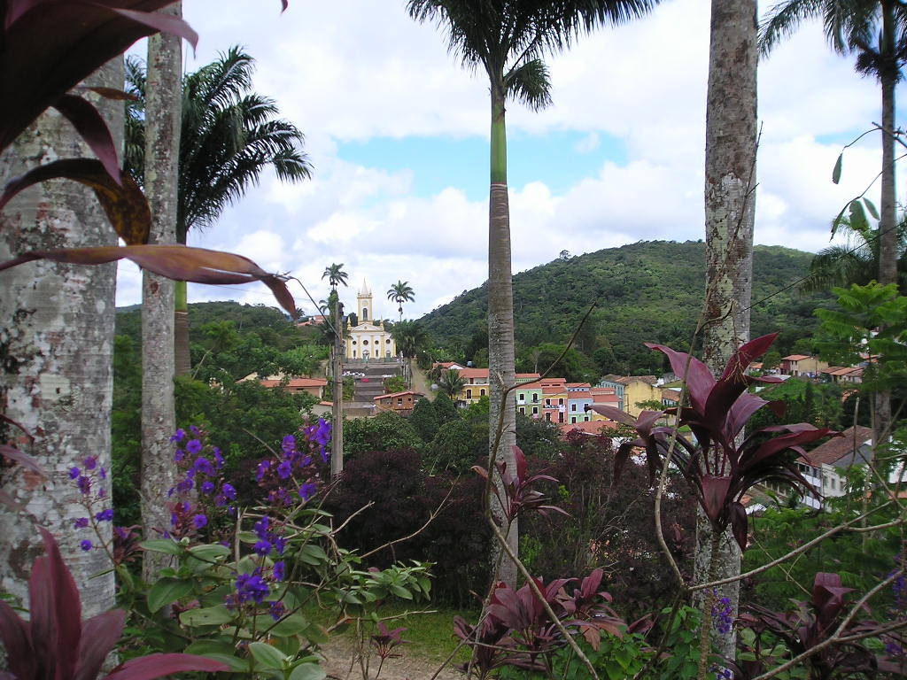 Vista da Matriz e cidade